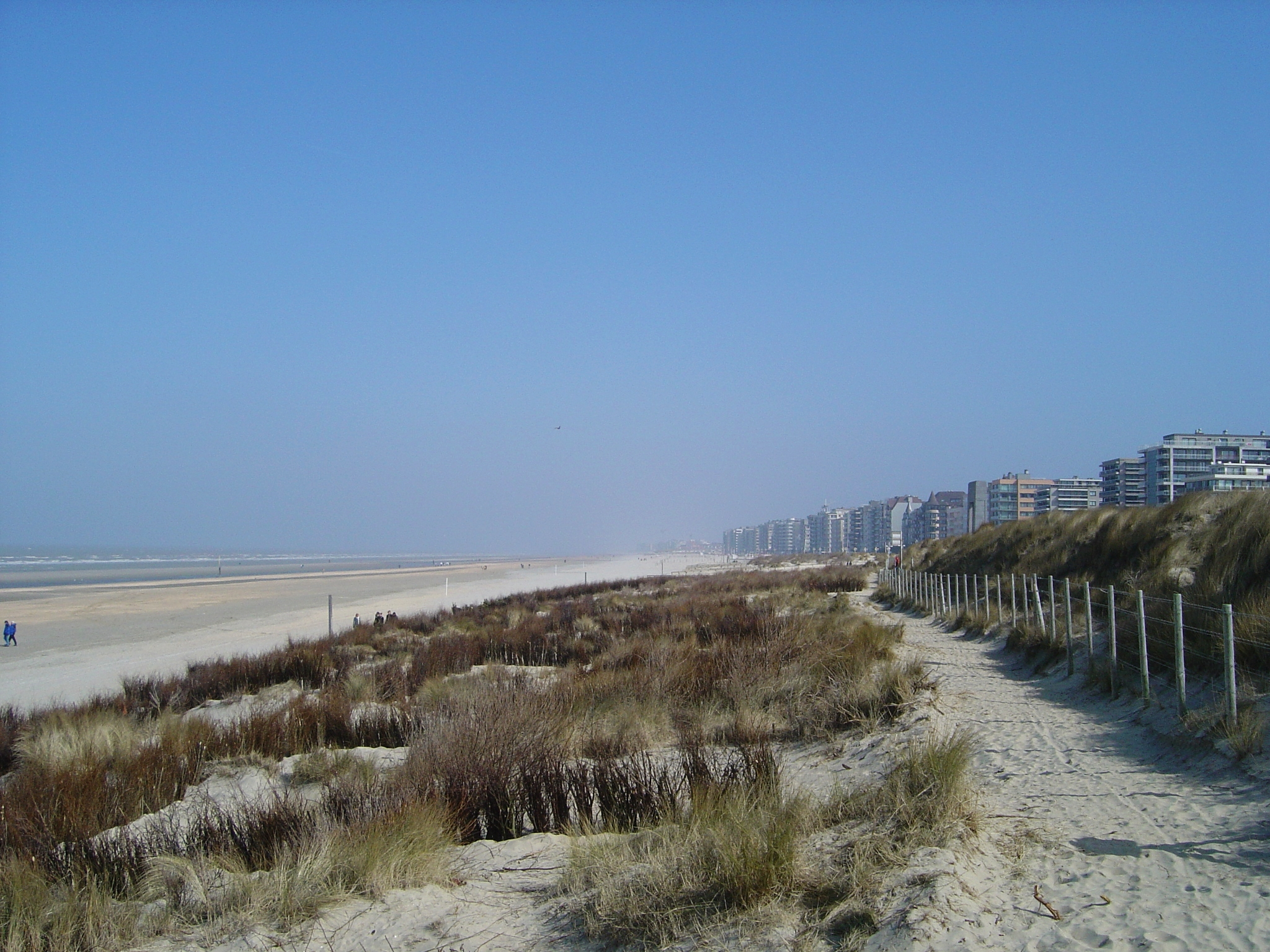 De Panne: Playa y apartamentos De Panne (Belgium) - the dunes and the beach - I took this picture in march 2006